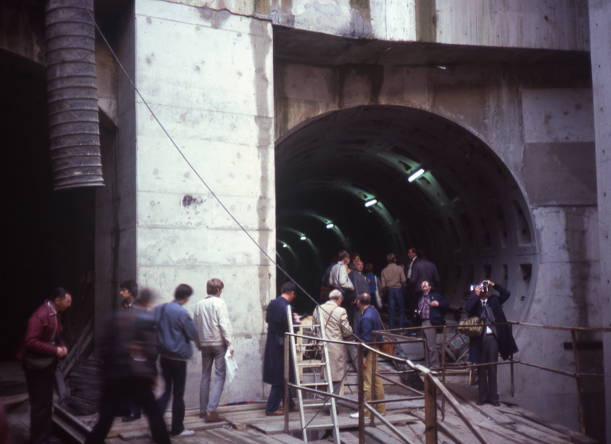 Een bezichtiging van de in aanbouw zijnde premetrotunnel van Antwerpen.